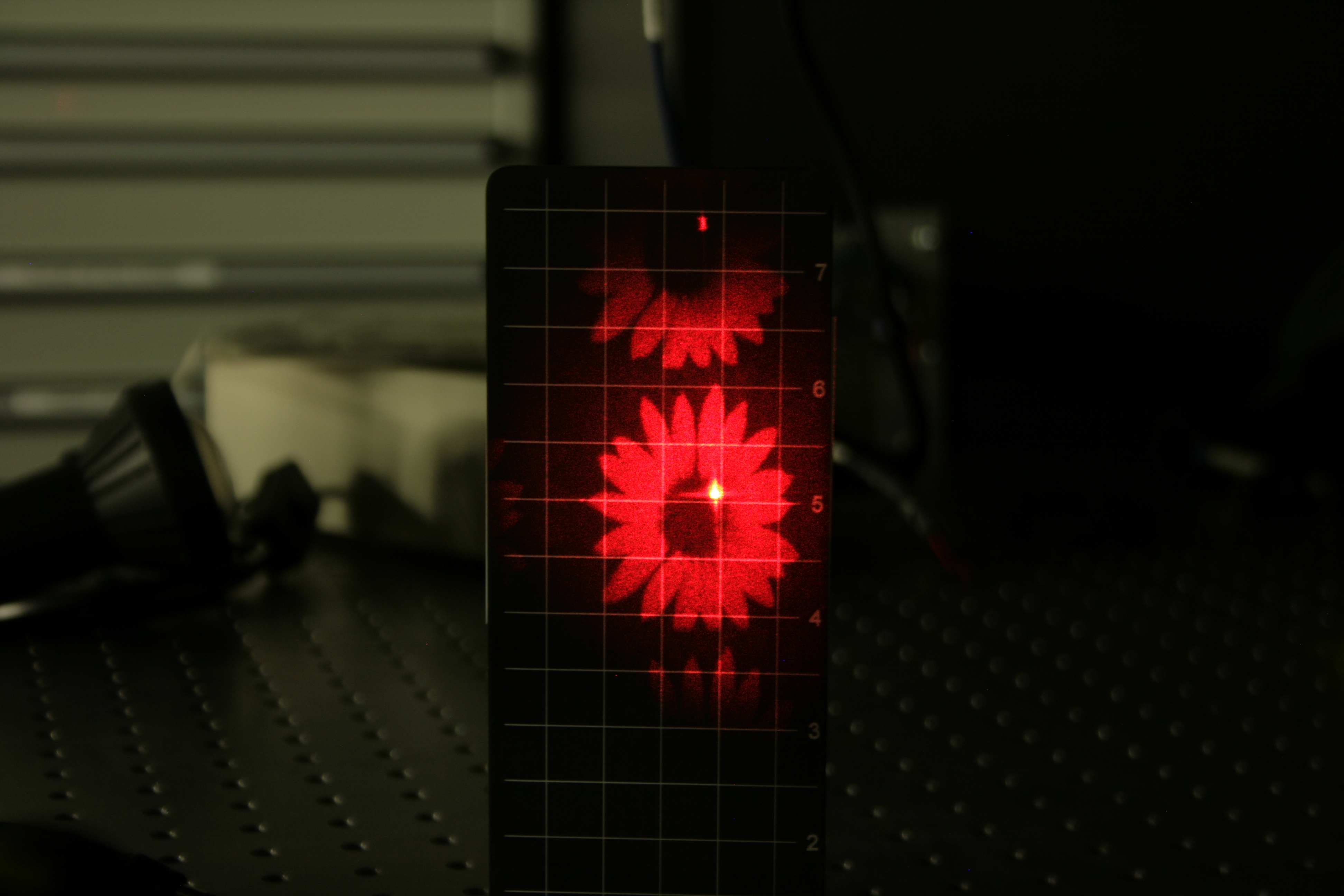 G-S algoritmiga arvutatud faasipildi kuvamine ruumilisele valgusmodulaatorile ja peegeldunud valgusest Fourier pöörde võtmise tulemusena taastatud originaalne lille pilt.